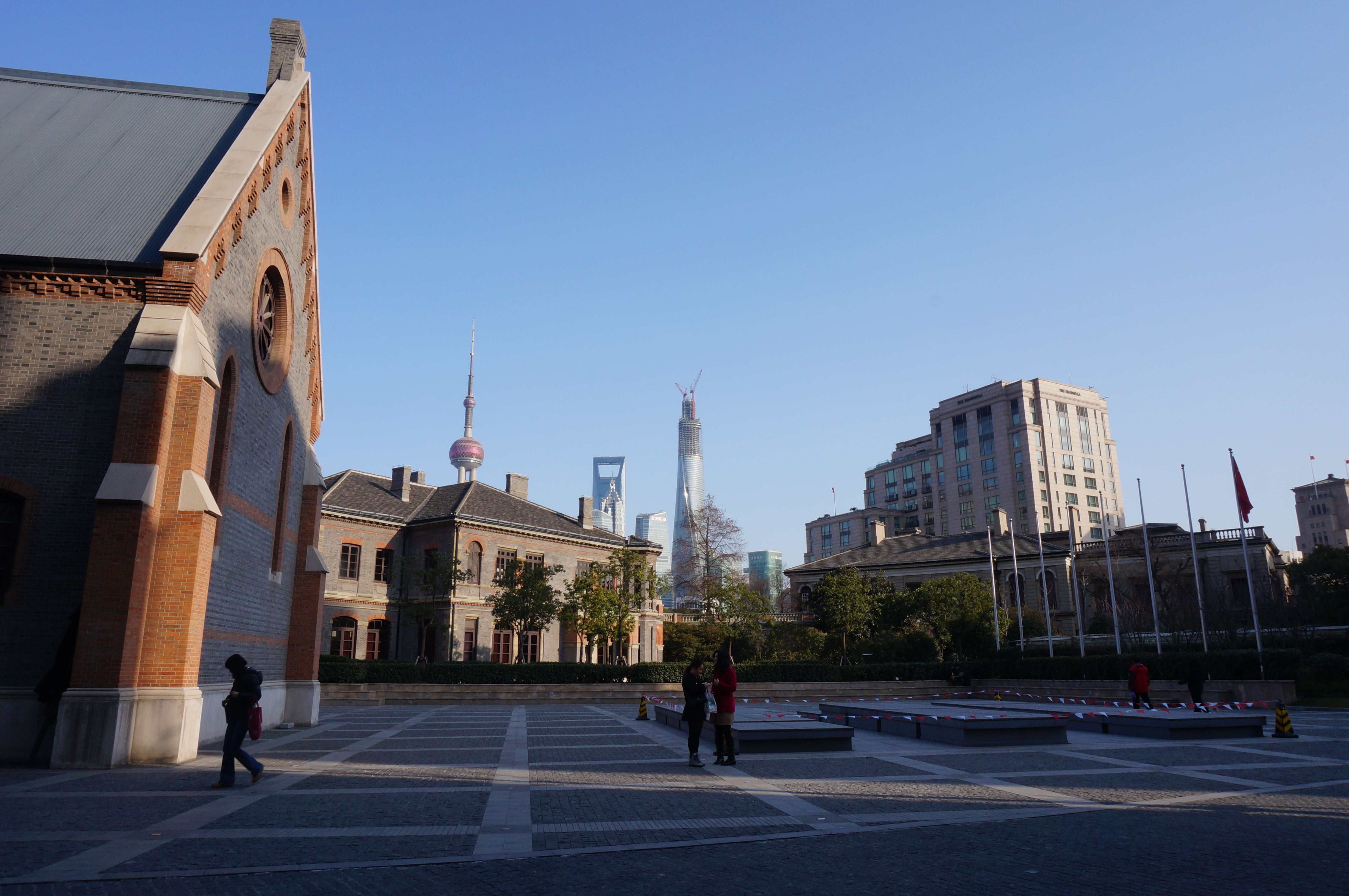 中文（中国大陆）: 外滩源33号项目